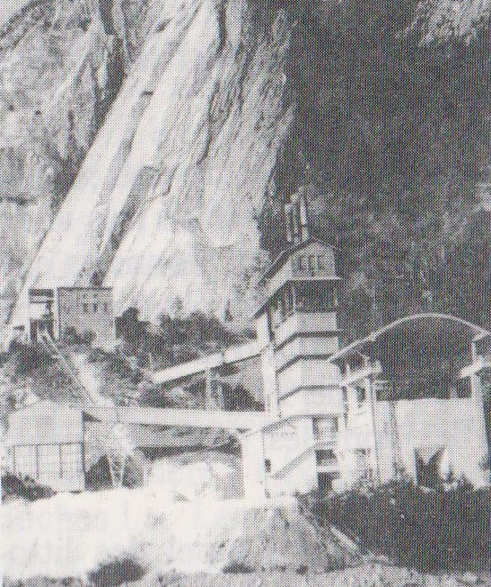 Au pied de la falaise où est la carrière de calcaire, le four à chaux.